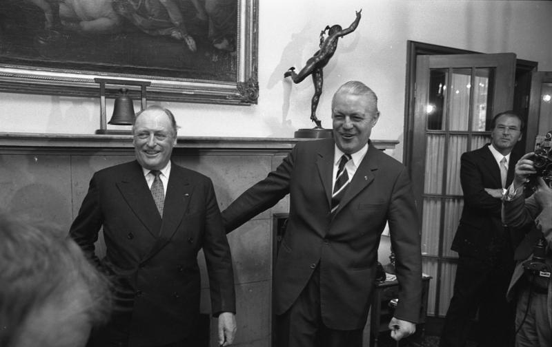 Staatsbesuch König Olav V. von Norwegen in Kiel mit dem Min. Präsidenten von Schleswig-Holstein, Gerhard Stoltenberg, im Landhaus 4.-8.6.1973